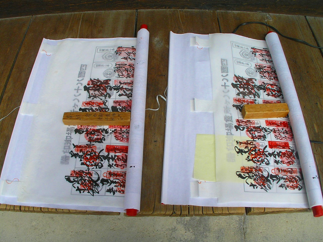 ３番金泉寺 四国八十八番霊場御印譜